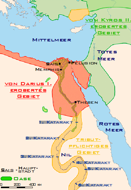 Ausdehnung des altes ägytischen Reiches (Spätzeit) Karte wurde selbst erstellt